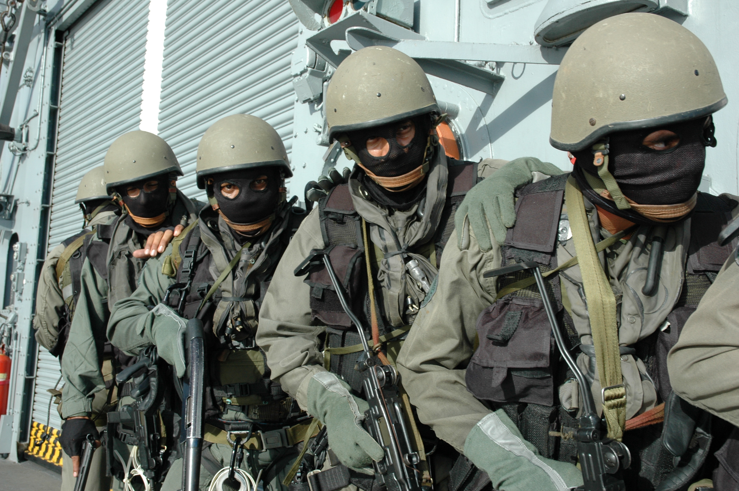 Arquivo liberado pela Marinha do Brasil através de projeto GLAM com Wiki Educação Brasil